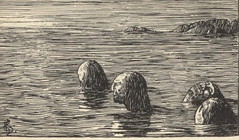 Halfdan Egedius: Illustration for Olav Trygvasons saga. Snorre 1899-edition. «Seidmændene paa Skratteskjær.» nb: «Seidmennene på Skratteskjær.» nn: «Seidmennene på Skratteskjær.»